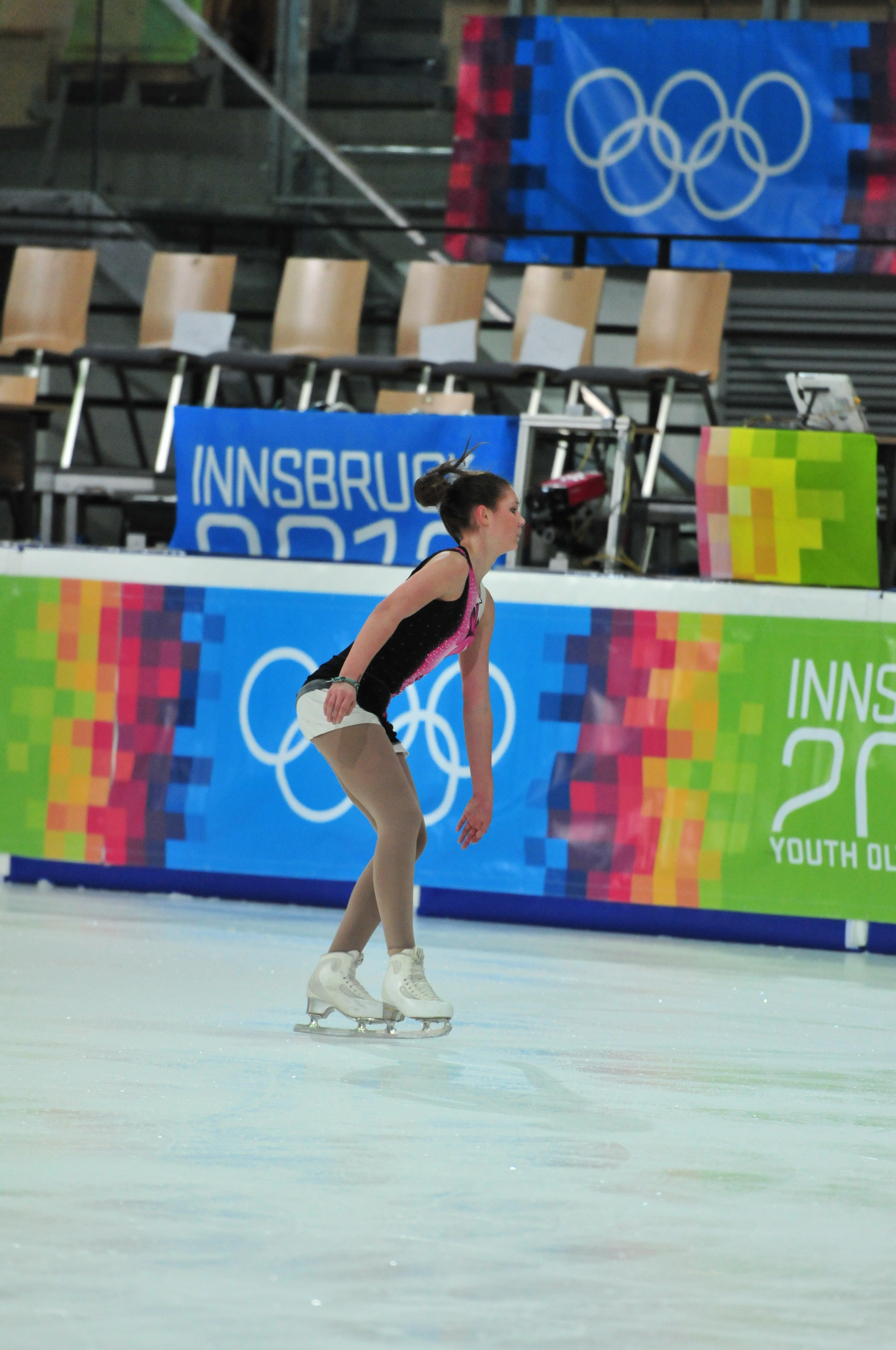 1. Jugendolympiade 2012 Innsbruck